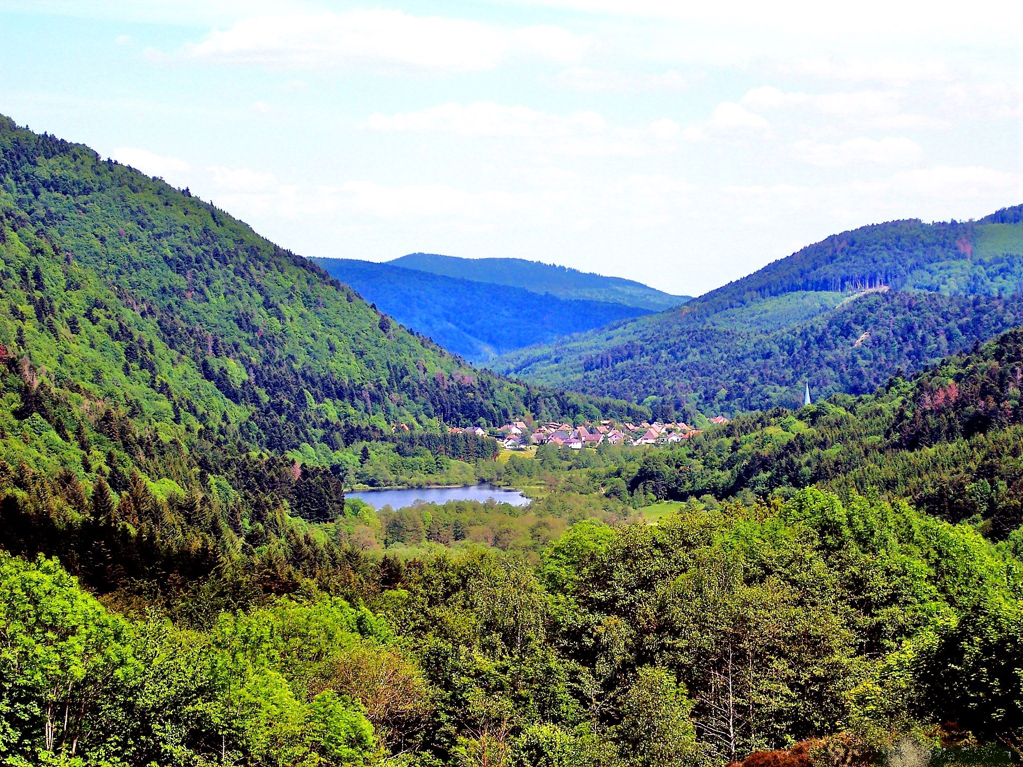 Lac de Séwen.